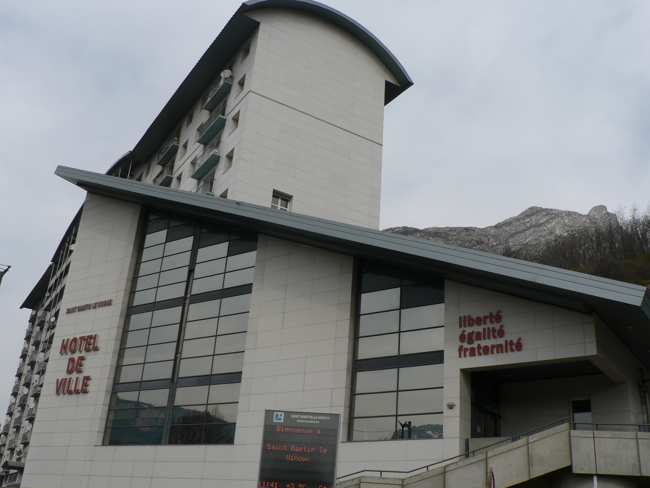 Mairie St Martin le Vinoux